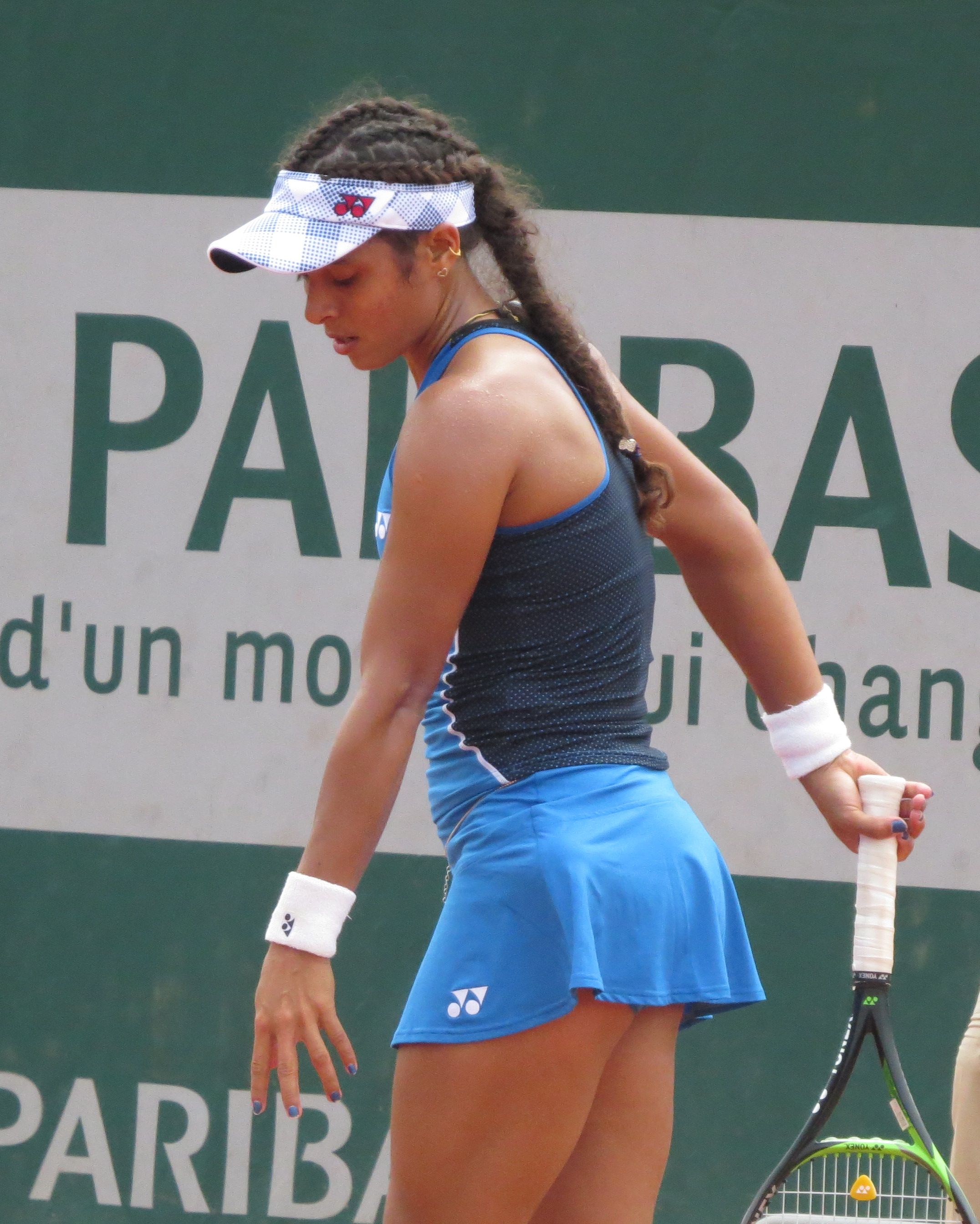 Ankita Raina lors de son premier tour des qualifications face à Evgeniya Rodina (court n°8).